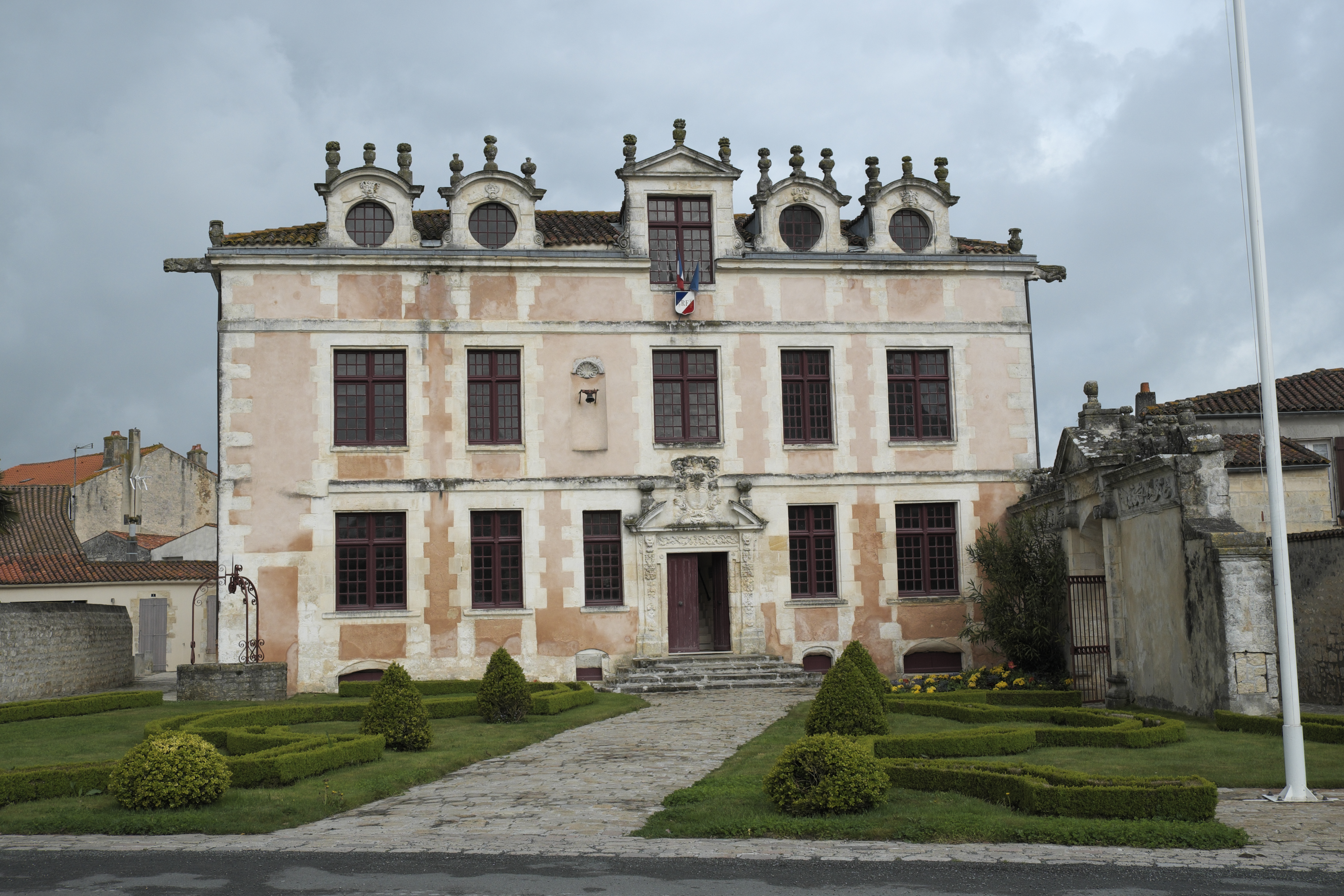 Hôtel des Rohan in Soubise im Département Charente-Maritime (Nouvelle-Aquitaine/Frankreich), heute Hôtel de ville (Rathaus)